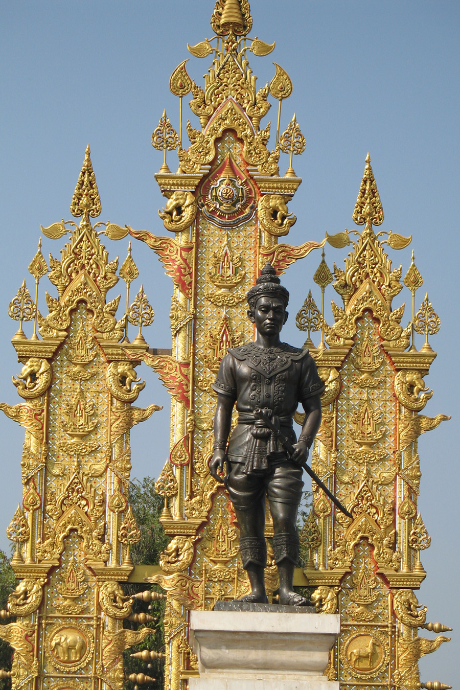 King Mengrai Monument.